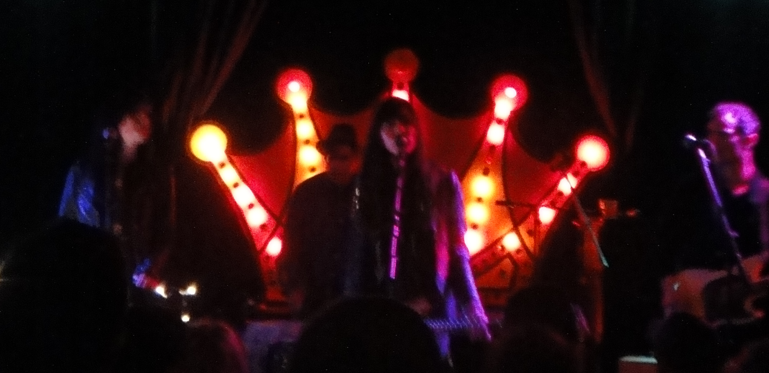 SISU